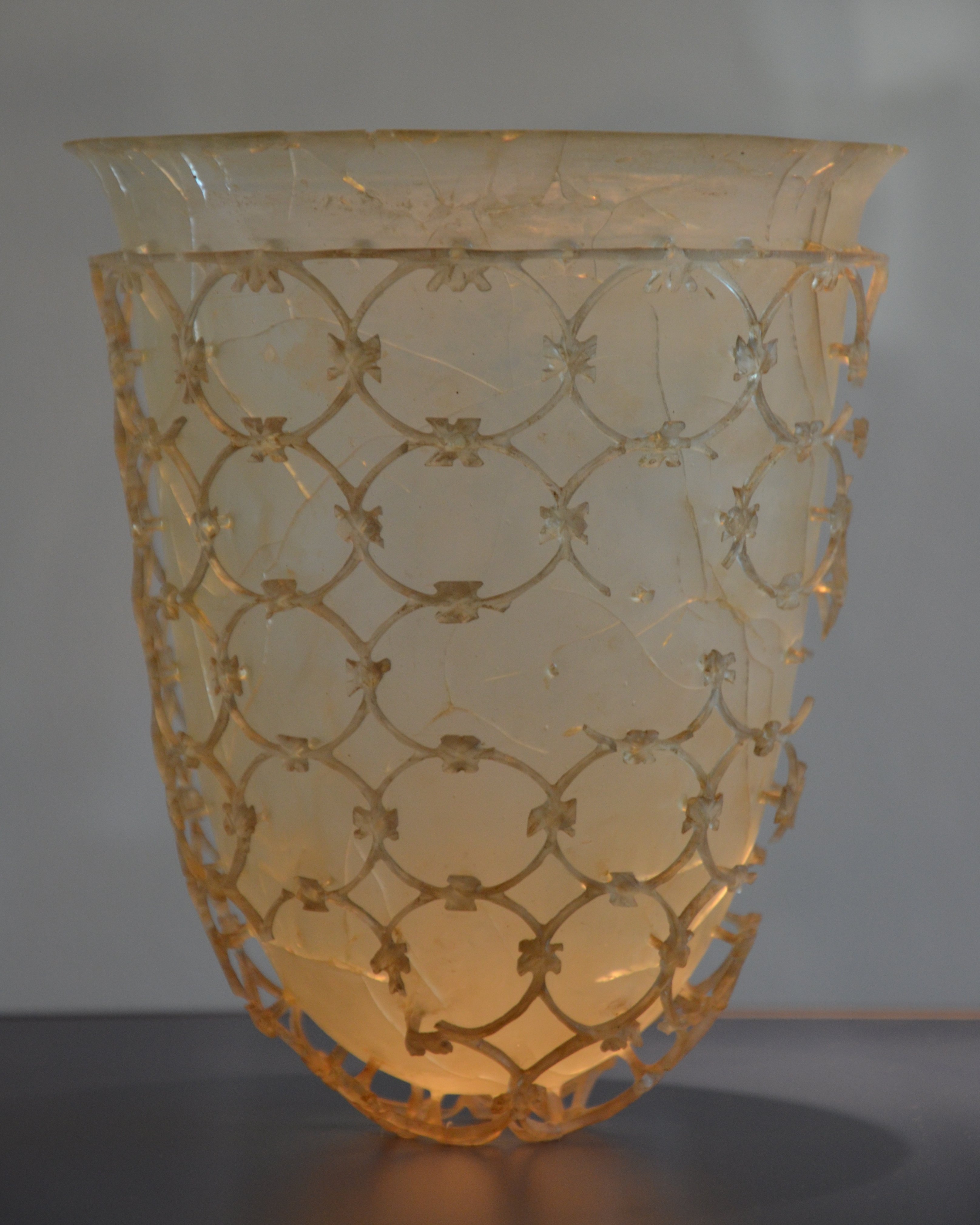 Diatretglas aus Piesport:[15] Bei Ausschachtungsarbeiten im Jahre 1950 im Ortsteil Niederemmel wurden drei Sandsteinsarkophage ca. 35 cm unter der Erdoberfläche gefunden. In einem dieser Sarkophage befand sich neben Skelettresten, einem Tongefäß, einer 38 cm langen Glasphiole auch ein außerordentlich gut erhaltenes 18 cm hohes Diatretglas. Es wird heute im Rheinischen Landesmuseum in Trier aufbewahrt.